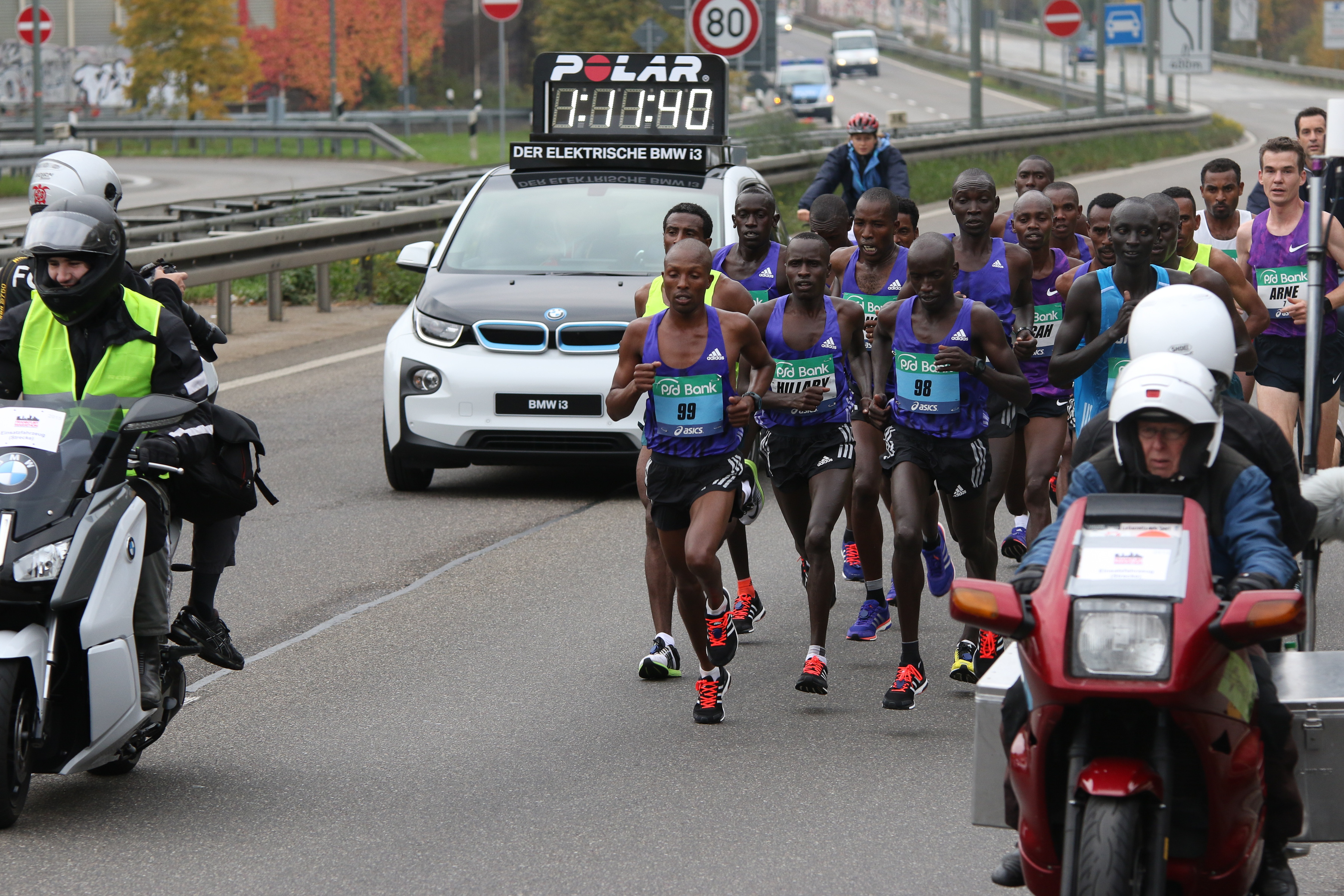 Frankfurt Marathon, 2015 Schwanheimer Brücke. Wilfred Kirwa Kigen (99), Hillary Kipchumba, Norbert Kigen (98), Arne Gabius